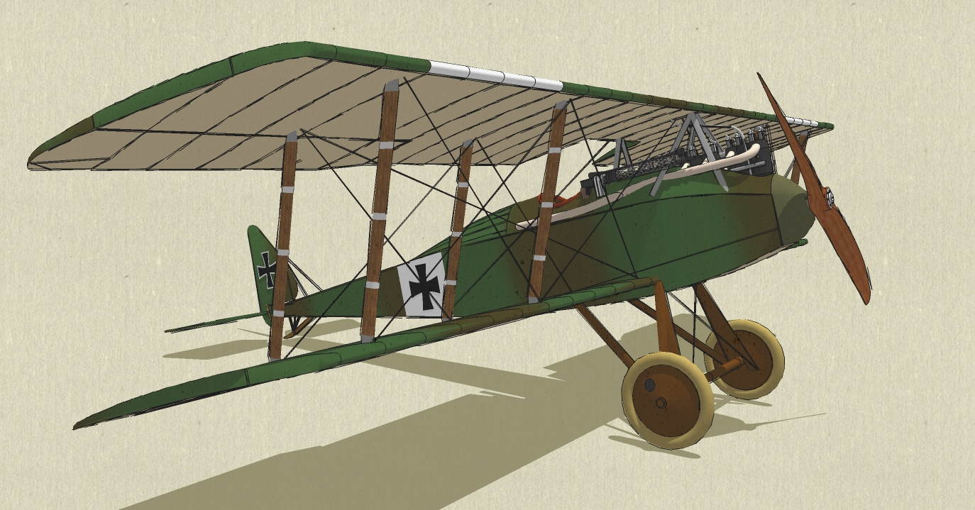 Vue Halberstadt D.II